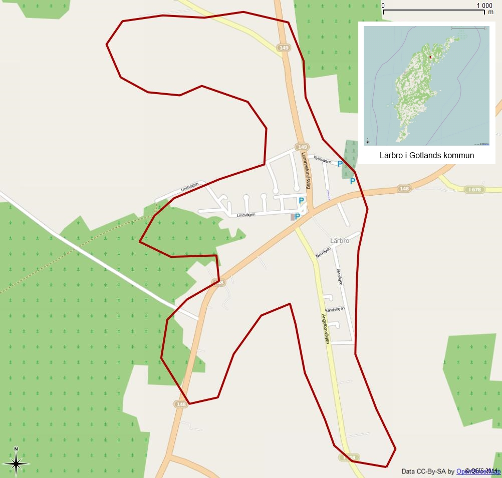 Tätorten Lärbros gränser 1990 enligt Atlas över rikets indelningar 1992.